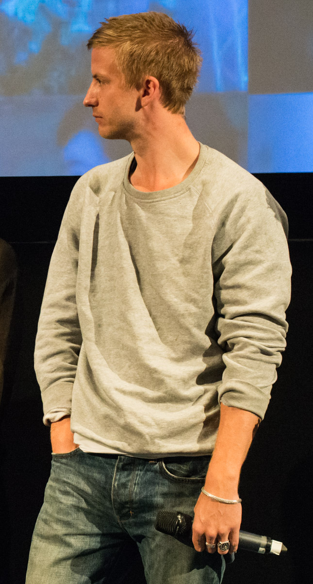 Filip Berg under presentationen av den Svenska filmhösten i Filmhuset i Stockholm den 17 augusti 2015.